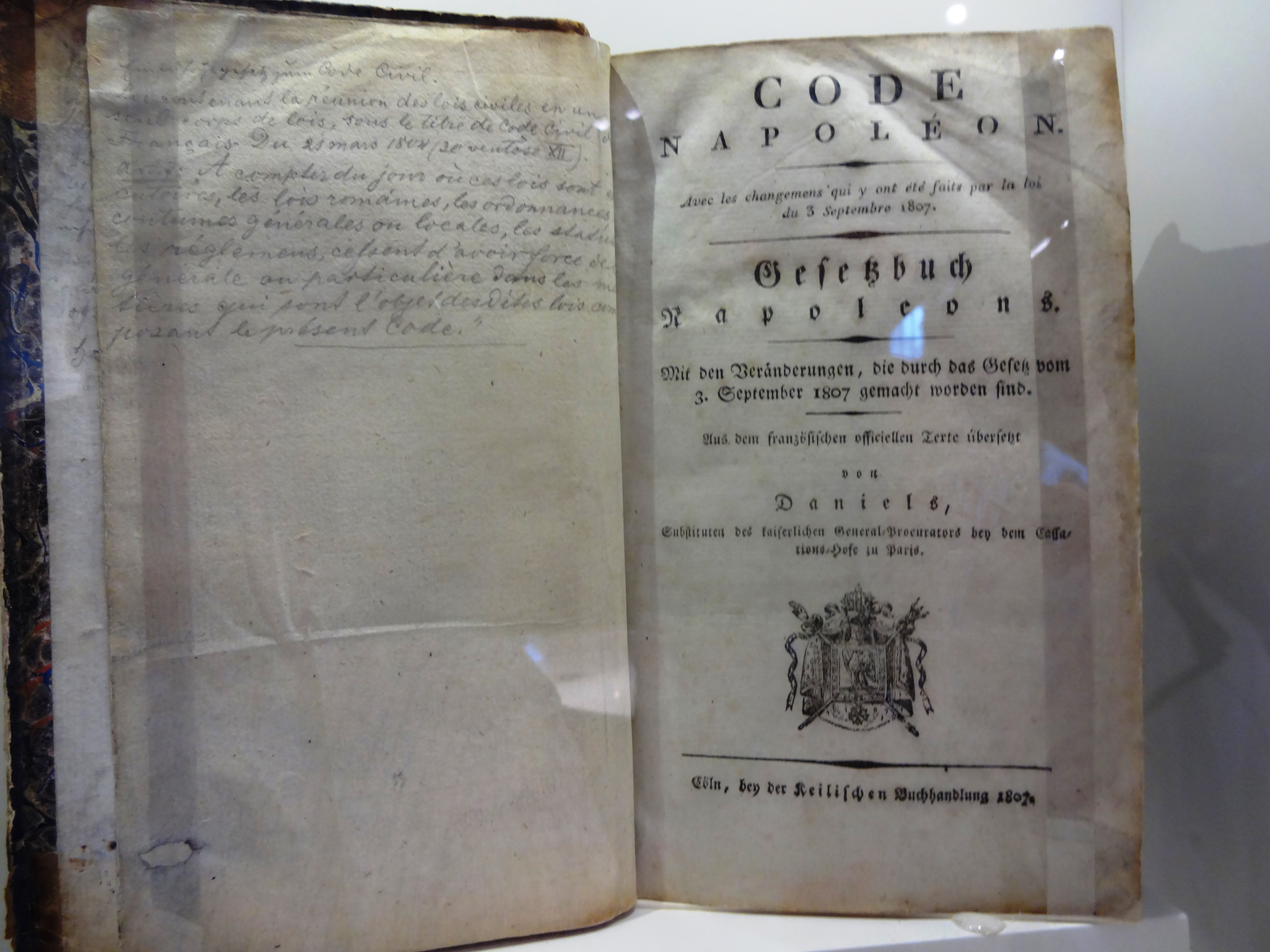 deutsche Ausgabe Code civile von 1807, Museum Hambacher Schloss